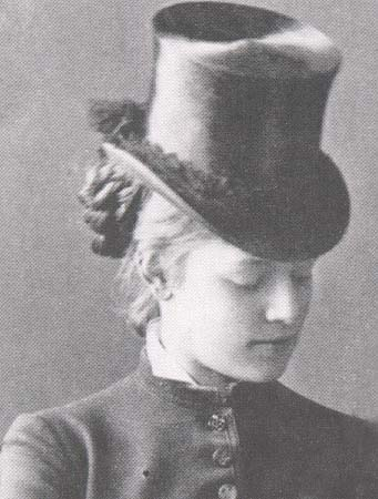 Countess Marie Larisch von Wallersee-Moennich